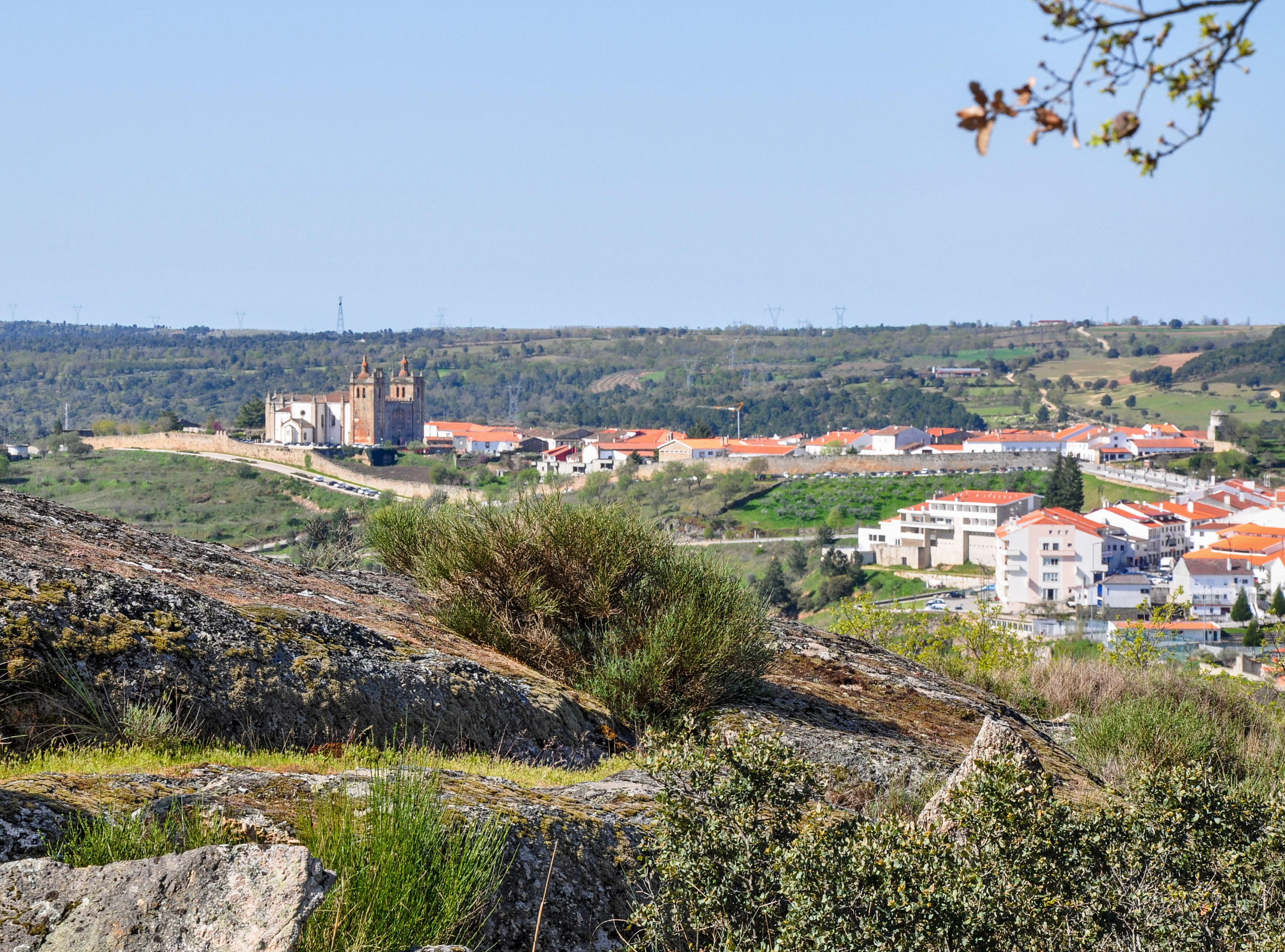 Panorámica de Miranda del Duero, Portugal.